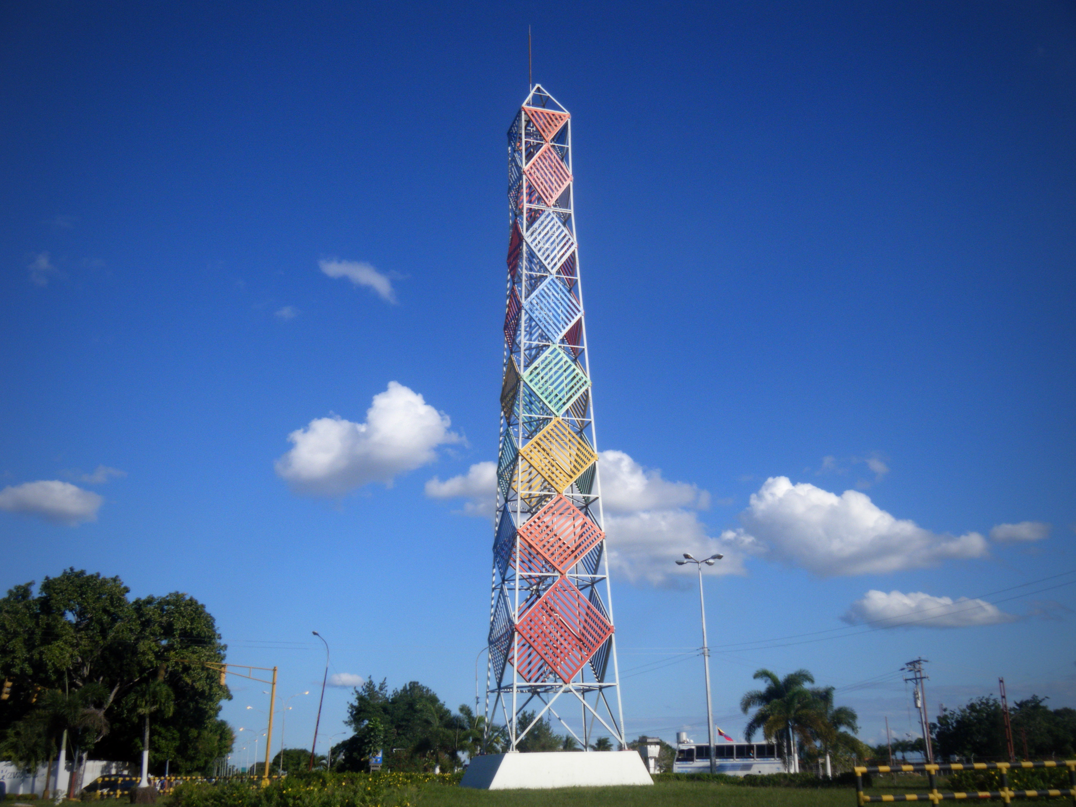 Torre Espacial Lumino-Cromática. Diseñado por Juvenal Ravelo un artista que le gusta jugar con las ilusiones ópticas, nacido en Caripito. Esta torre esta ubicada en Maturín, Estado Monagas, Venezuela.